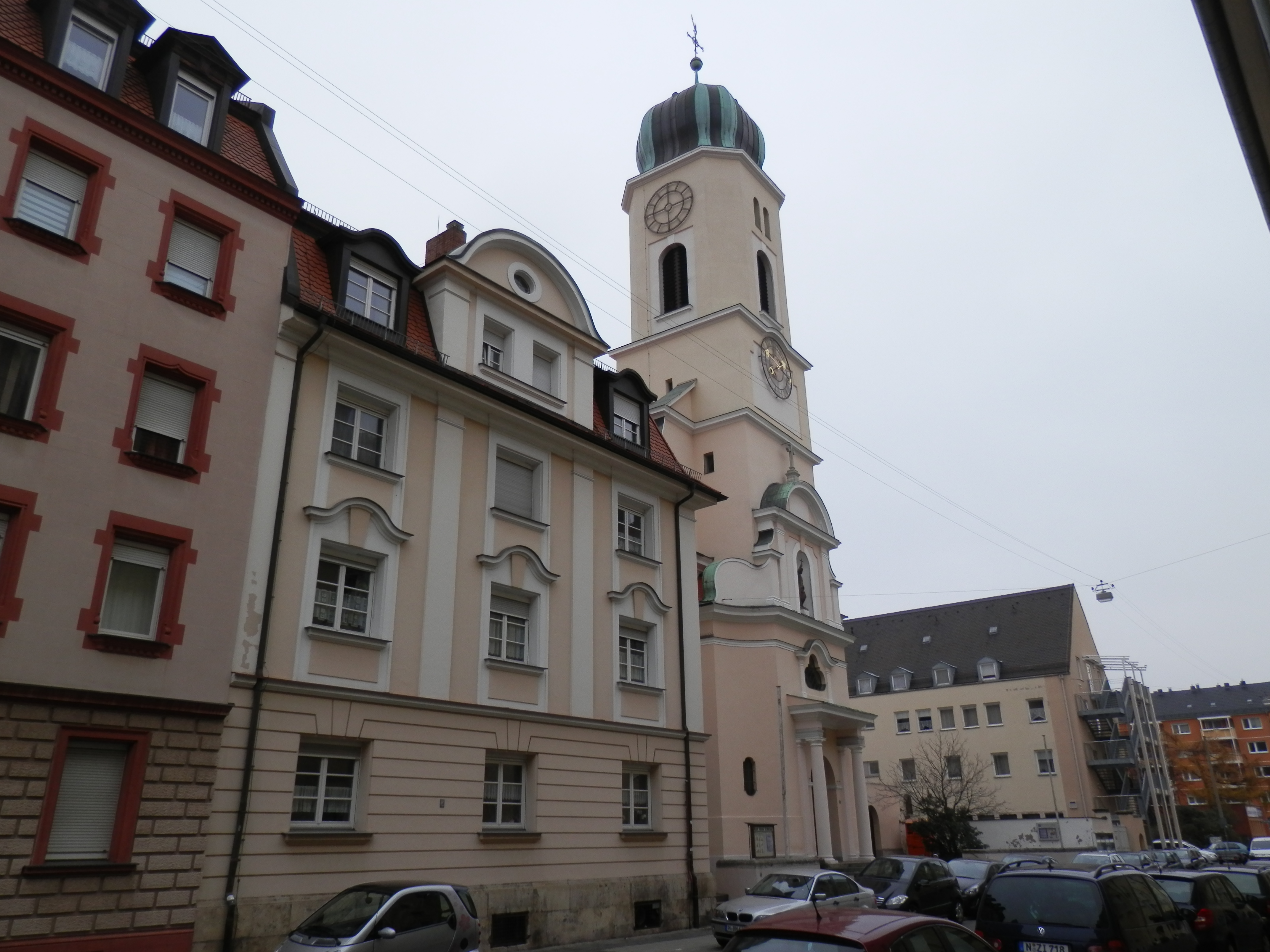 Kirche St. Michael Nürnberg